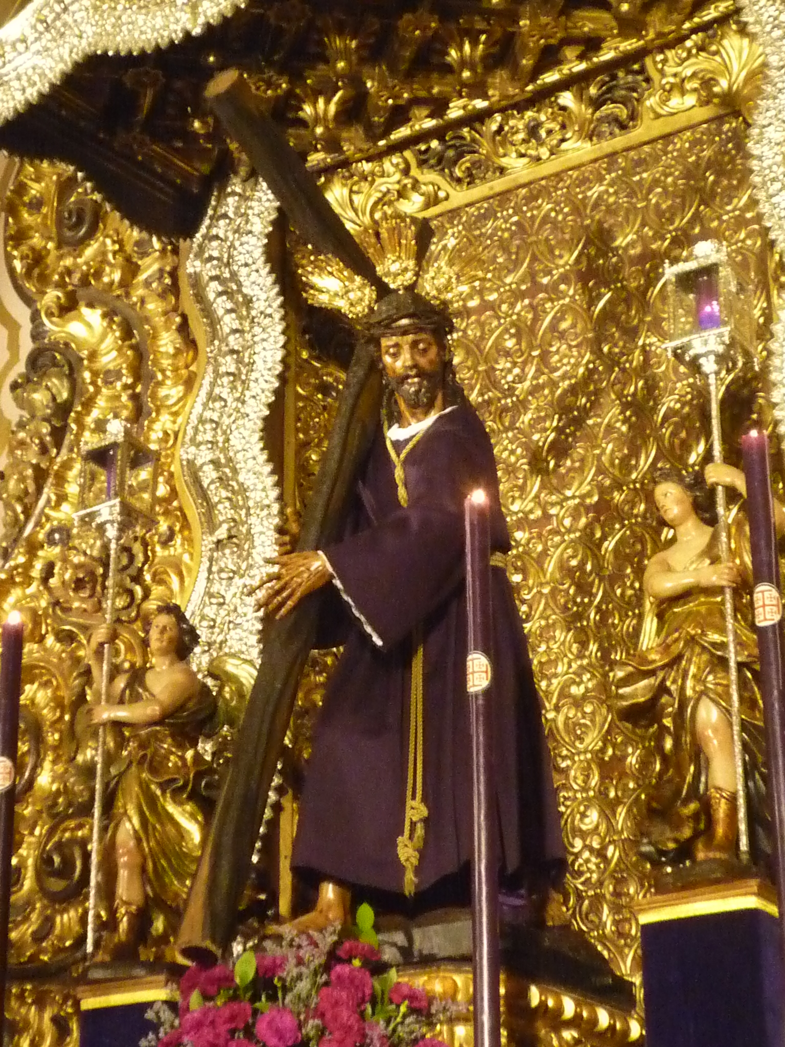 Jesús del Nazareno en el Retablo mayor del silencio de sevilla.